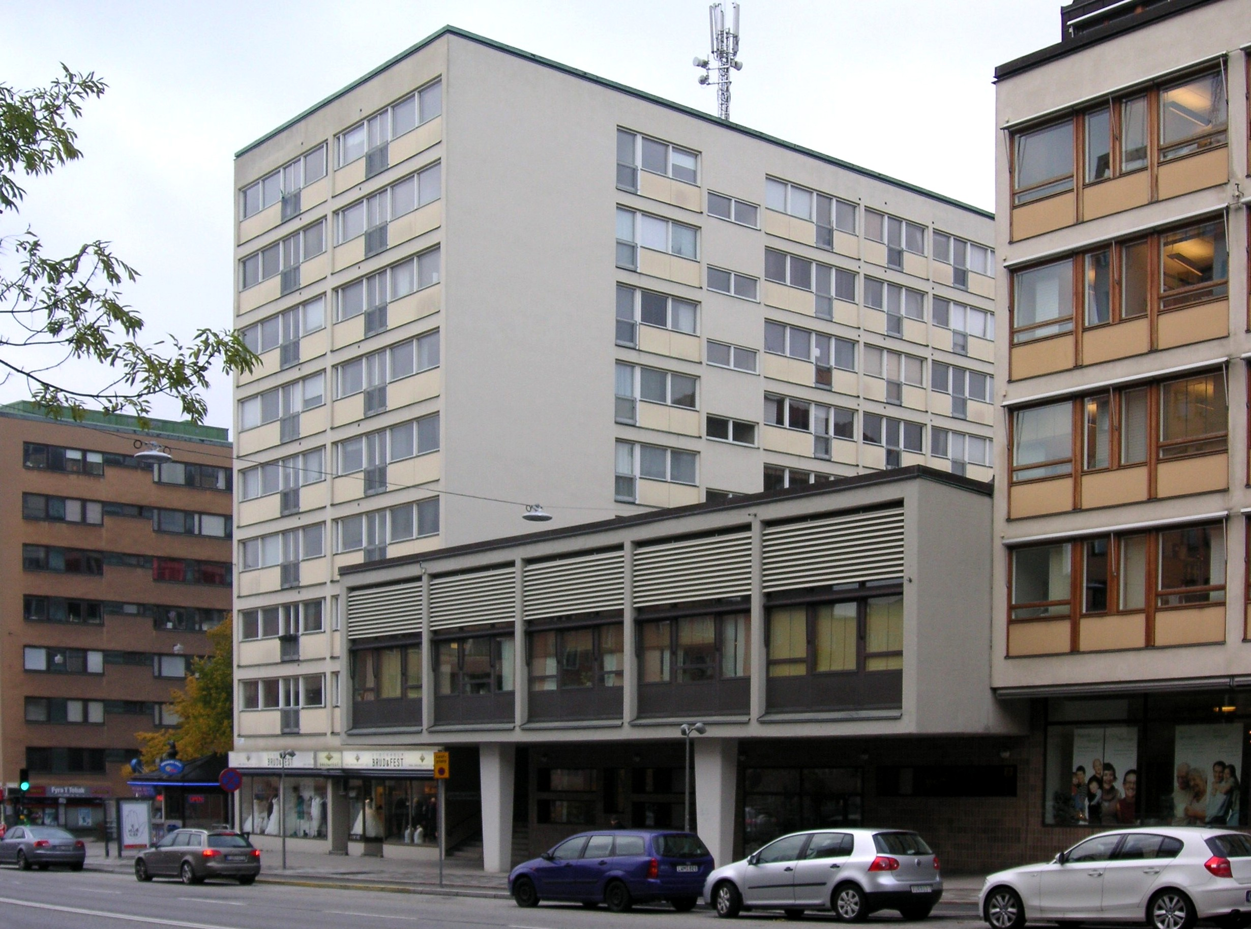 Hornsgatan 132 i Stockholm, Sjuksköterskebostäder, arkitekt Lennart Tham